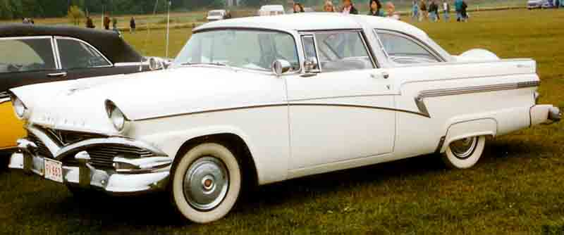 Meteor Rideau Crwon Victoria 1956